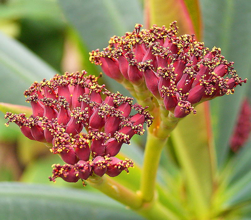 Euphorbia pachypodioides - BG Heidelberg, Germany